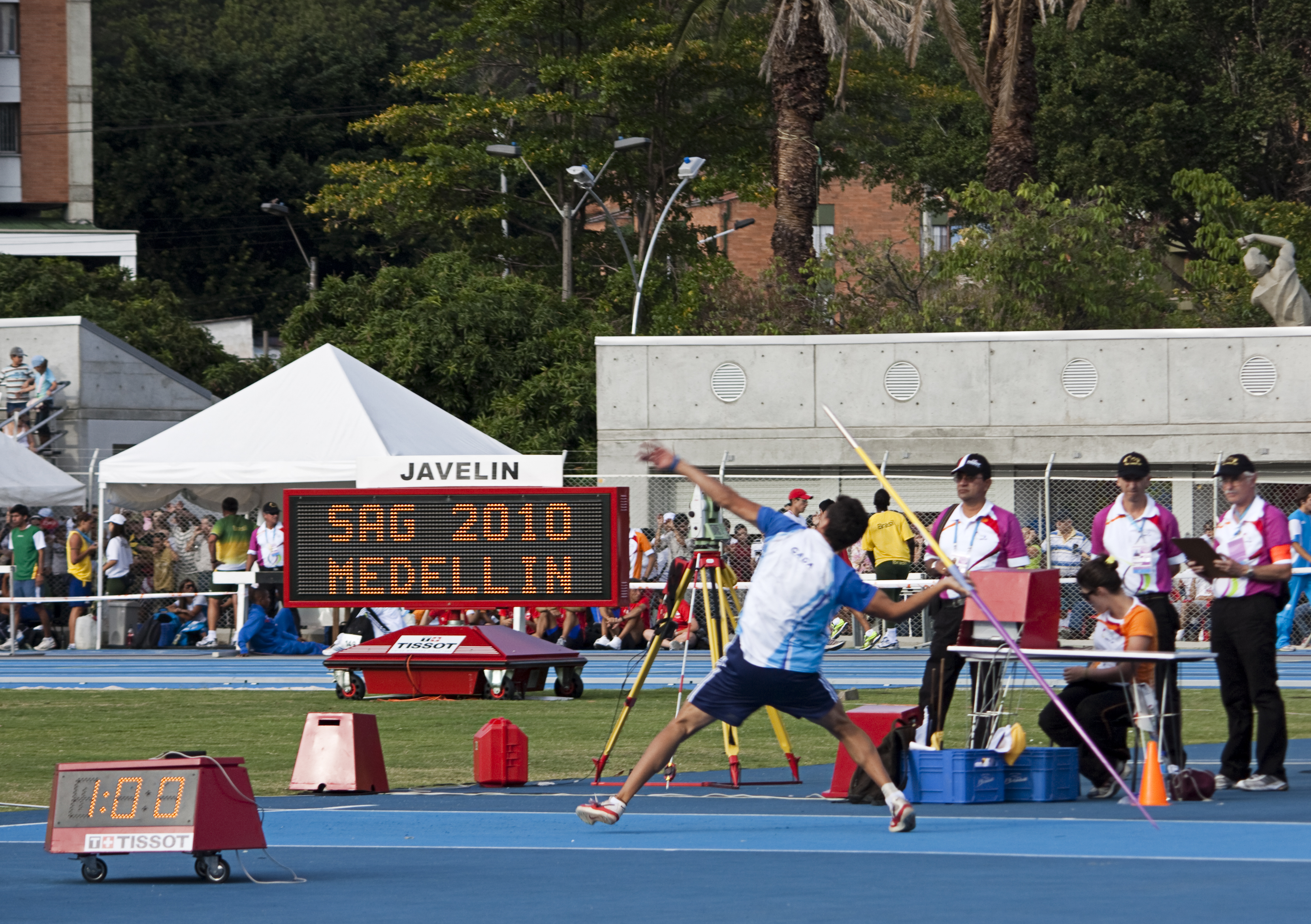 Lanzamiento de Jabalina - Atletismo en los Juegos Sudamericanos de Medellín 2010